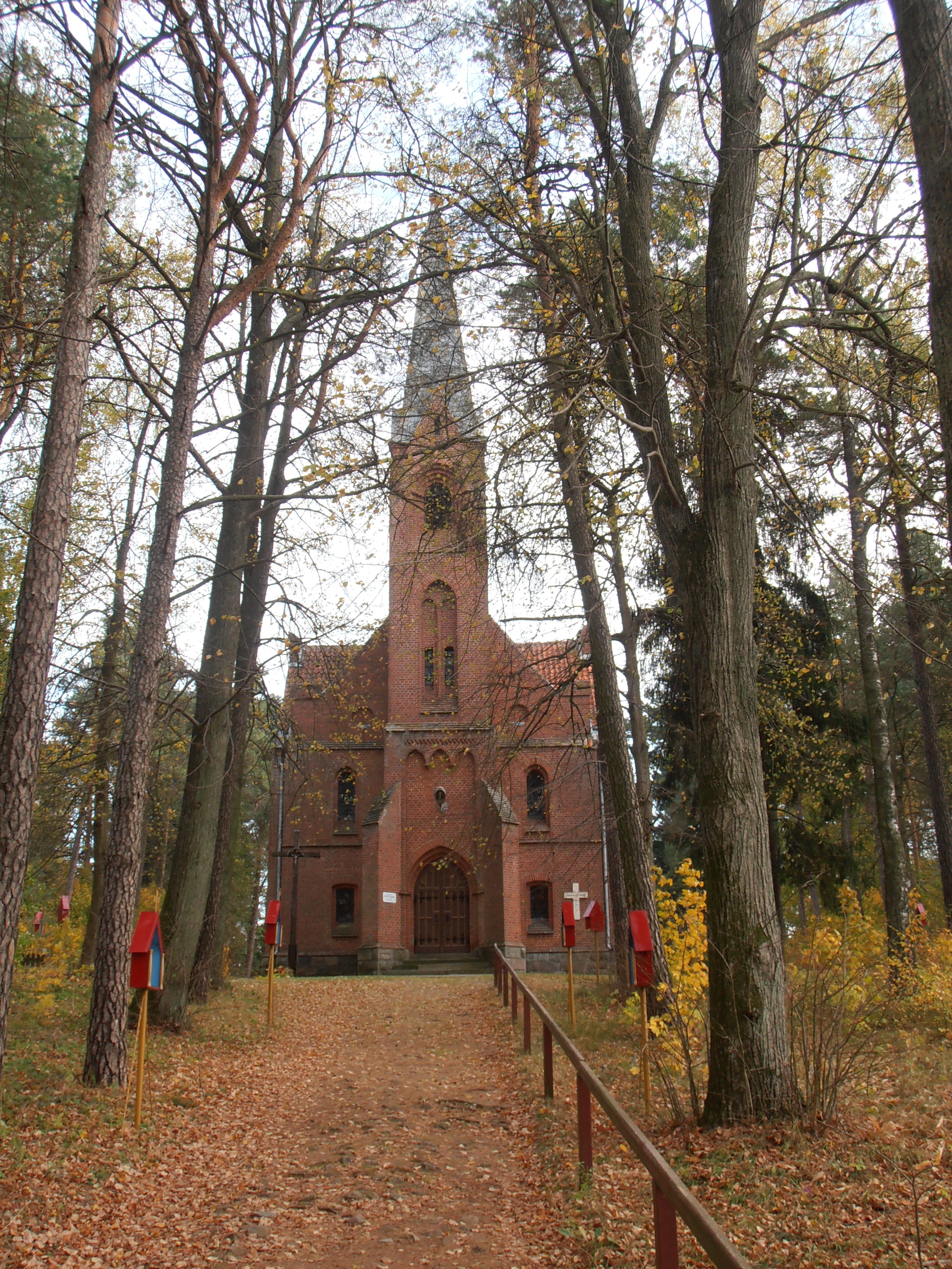 Nowa Wieś - dawny kościół ewangelicki, obecnie rzymskokatolicki filialny pw. św. Józefa wraz z cmentarzem przykościelnym, 1883-1888.